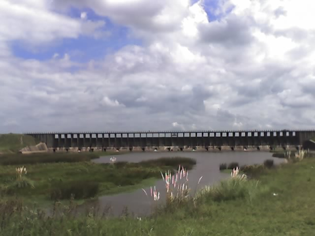 Represa Roggero (Roggero Dam), Reconquista River's source, Merlo Partido, Buenos Aires Province.